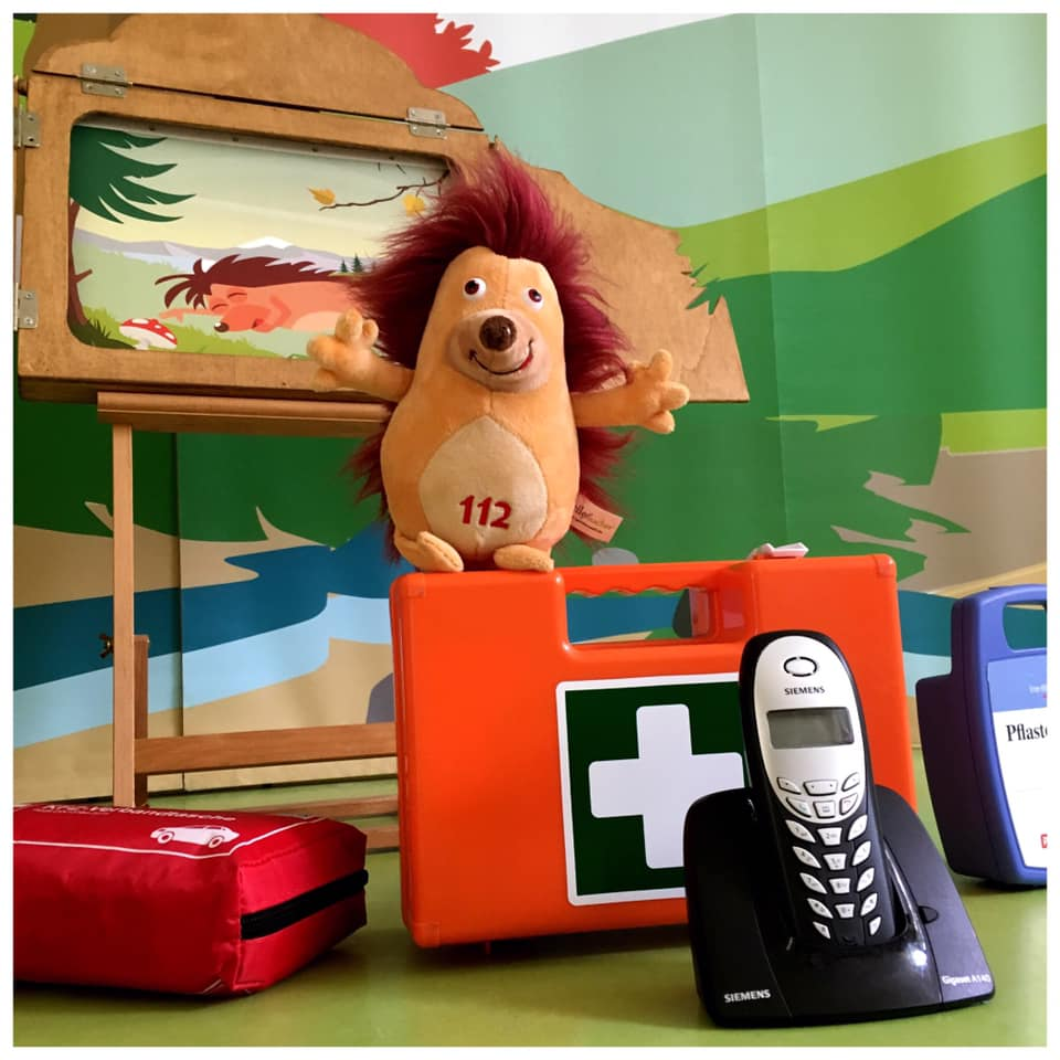 Auswahl von Materialien für einen Pflasterpass-Kurs